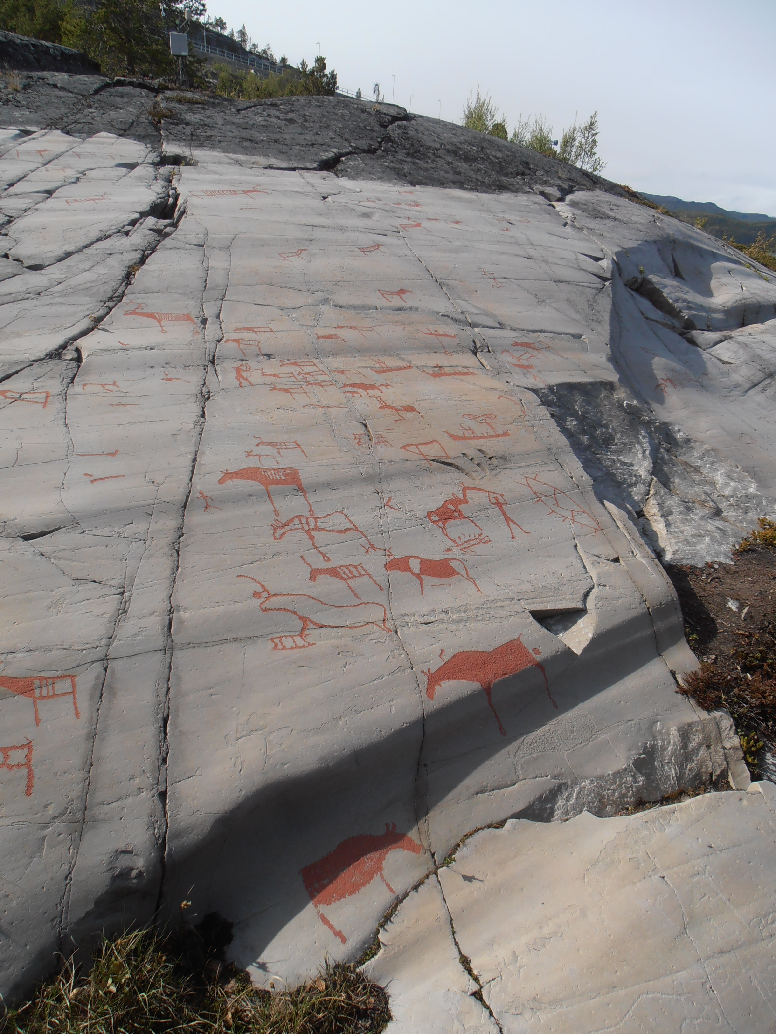 Roques amb les senyals d'art rupestre